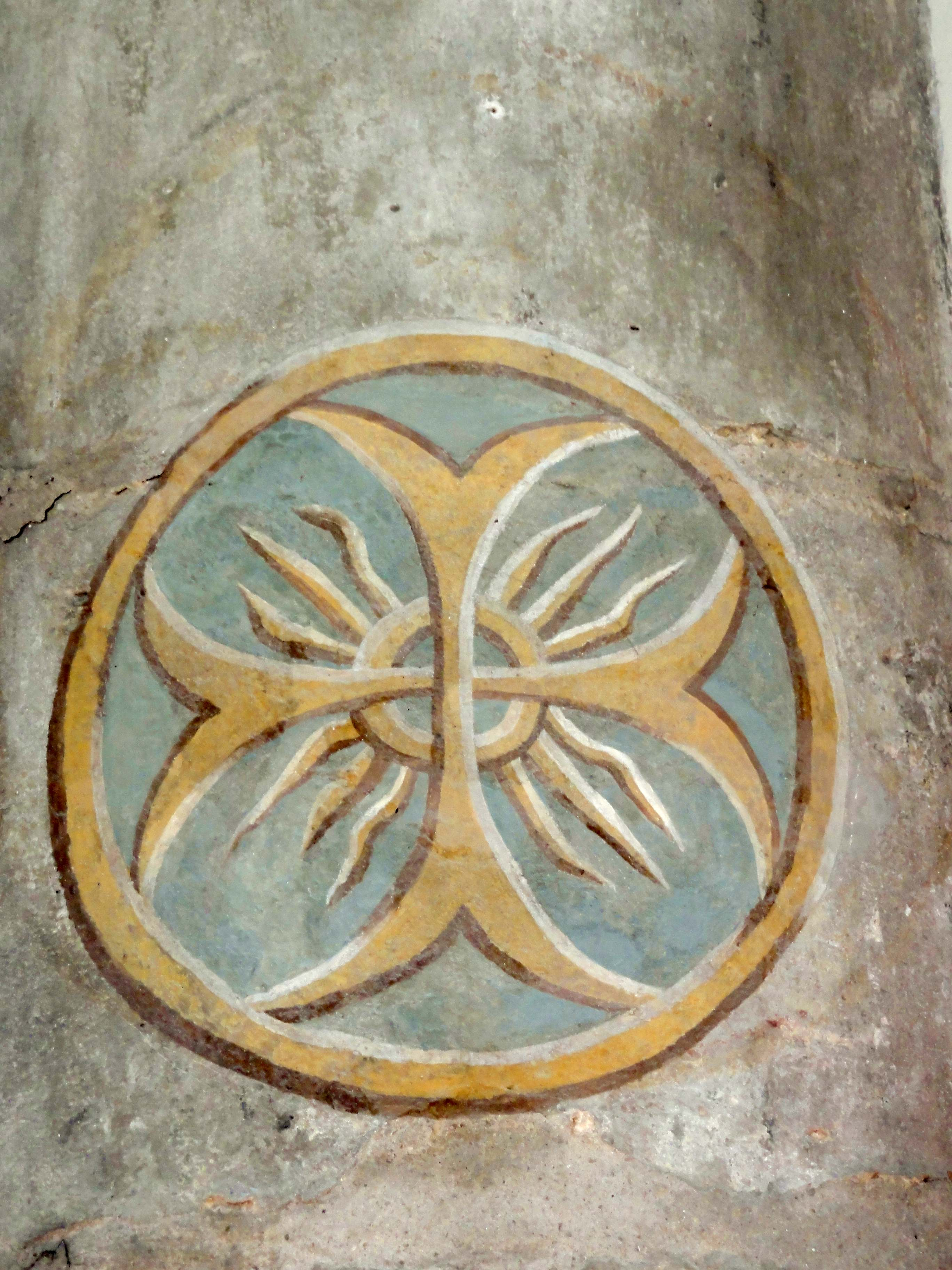 Croix de consécration dans l'angle sud-est.